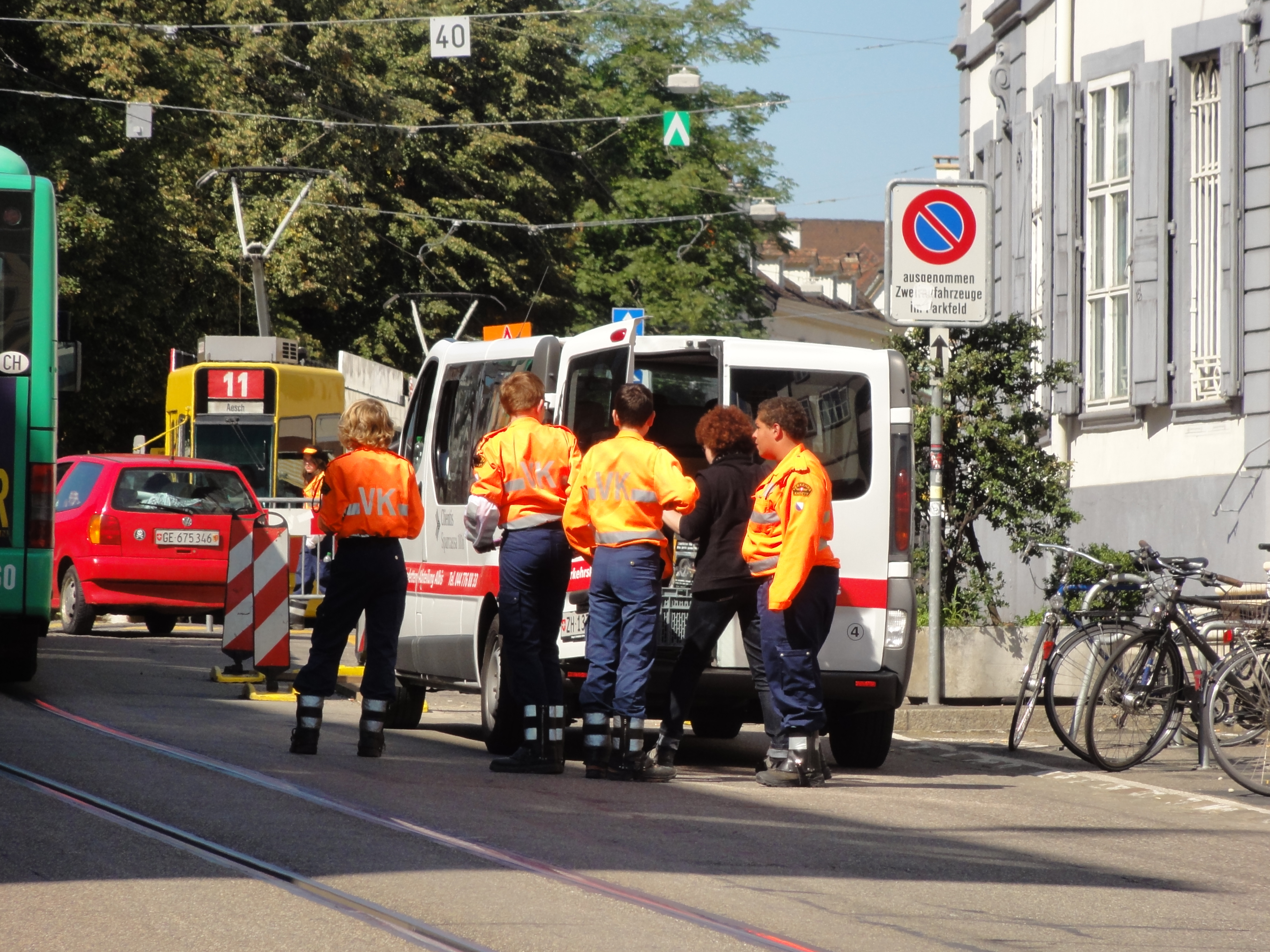 Basel Stadt — Verkehrskadetten mit Dienstfahrzeug EXIF data with GPS coordinates and magnetic direction. GPS data may be inaccurate.